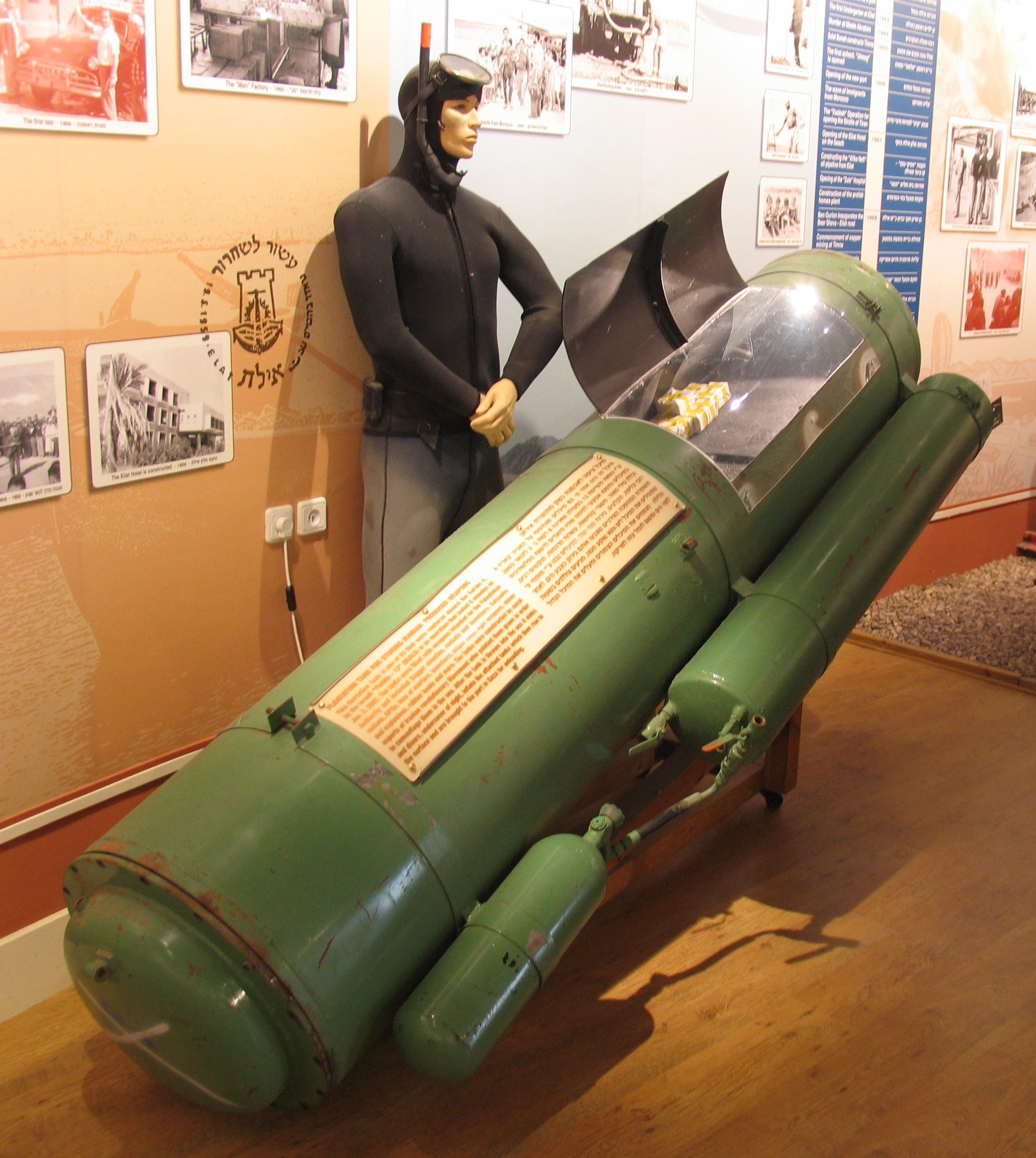 מיכל הצפת אמצעי לחימה שנתפס בקארין איי מוצג במוזיאון אילת עירי